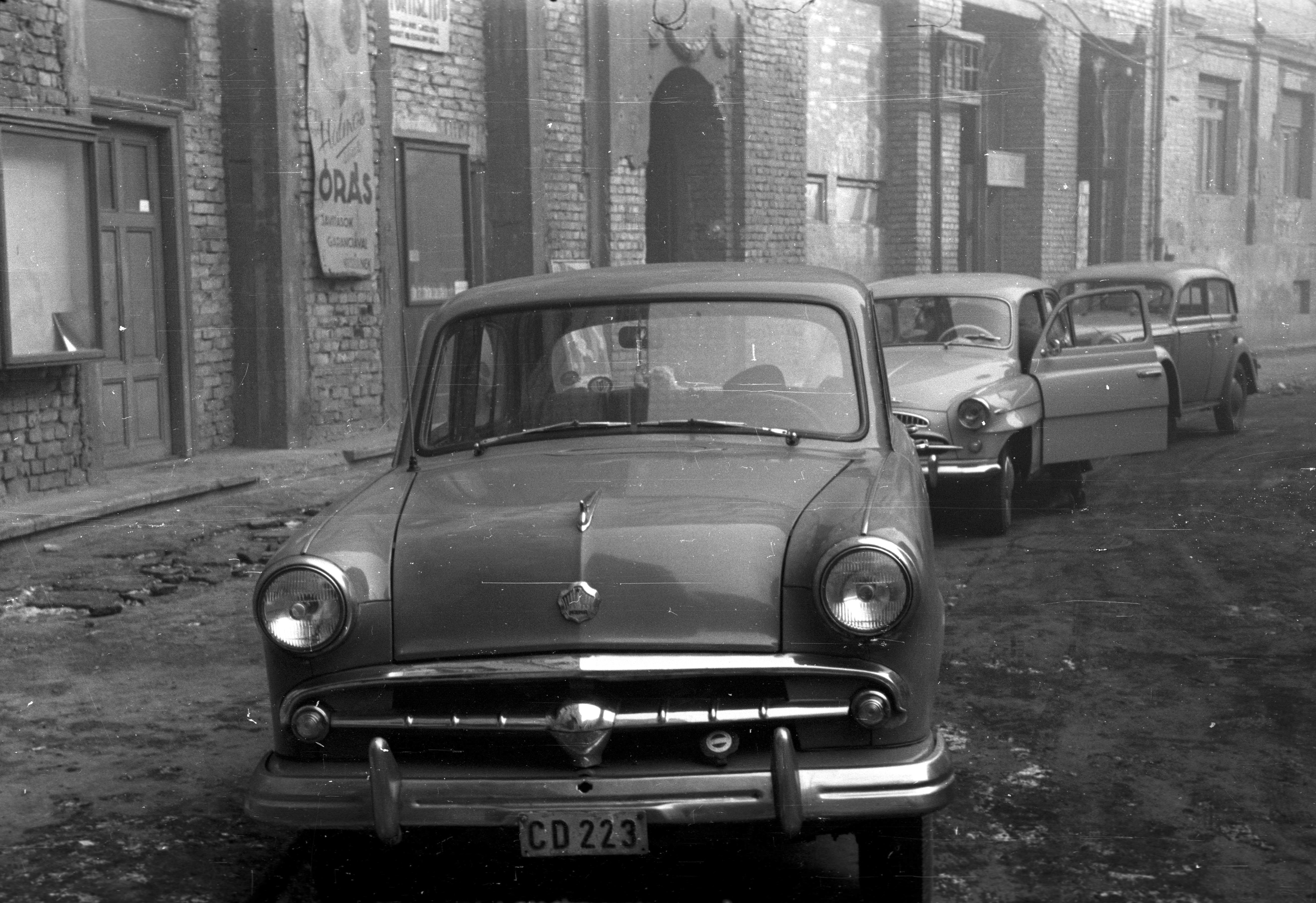 Corvin (Kisfaludy) köz, a felvétel a 4. számú ház előtt készült. A kép forrását kérjük így adja meg: Fortepan / Budapest Főváros Levéltára. Levéltári jelzet: HU.BFL.XV.19.c.10 Location: Hungary, Budapest VIII. Tags: Budapest Title: Corvin (Kisfaludy) köz, a felvétel a 4. számú ház előtt készült. A kép forrását kérjük így adja meg: Fortepan / Budapest Főváros Levéltára. Levéltári jelzet: HU.BFL.XV.19.c.10